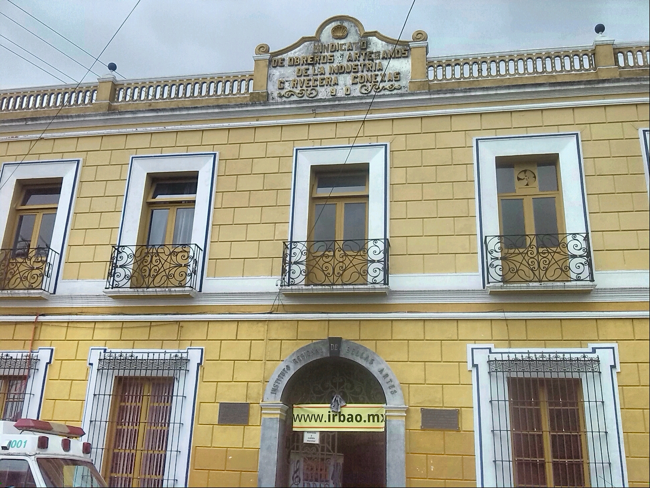 Teatro Irbao. Orizaba